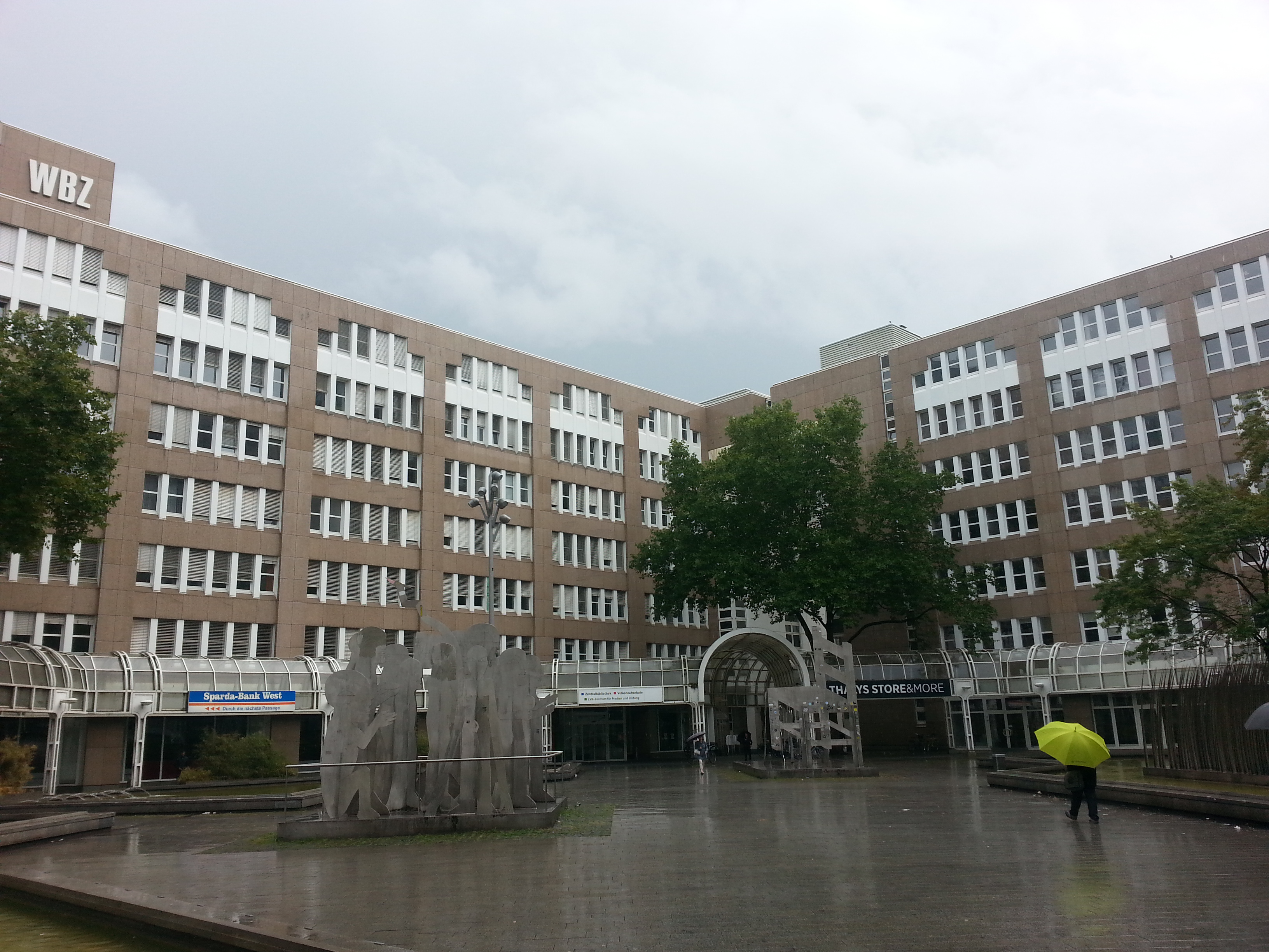 Volkshochschule Düsseldorf und Stadtbilbiothek Düsseldorf, Bertha-von-Suttner-Platz 1